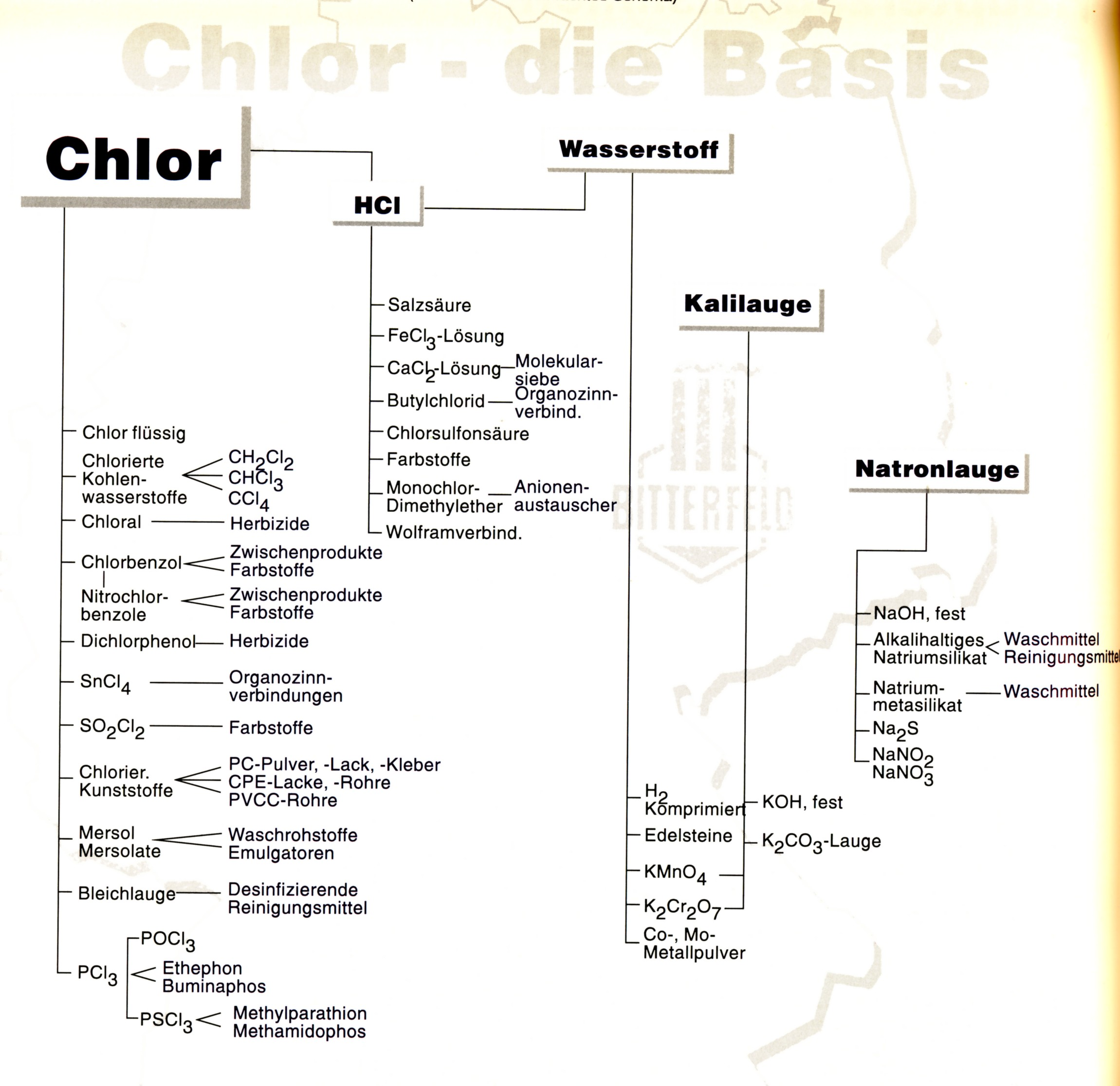 Haupterzeugnislinien der Chemie AG 1990